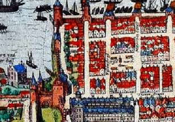 Fragment Alten Stettin-1